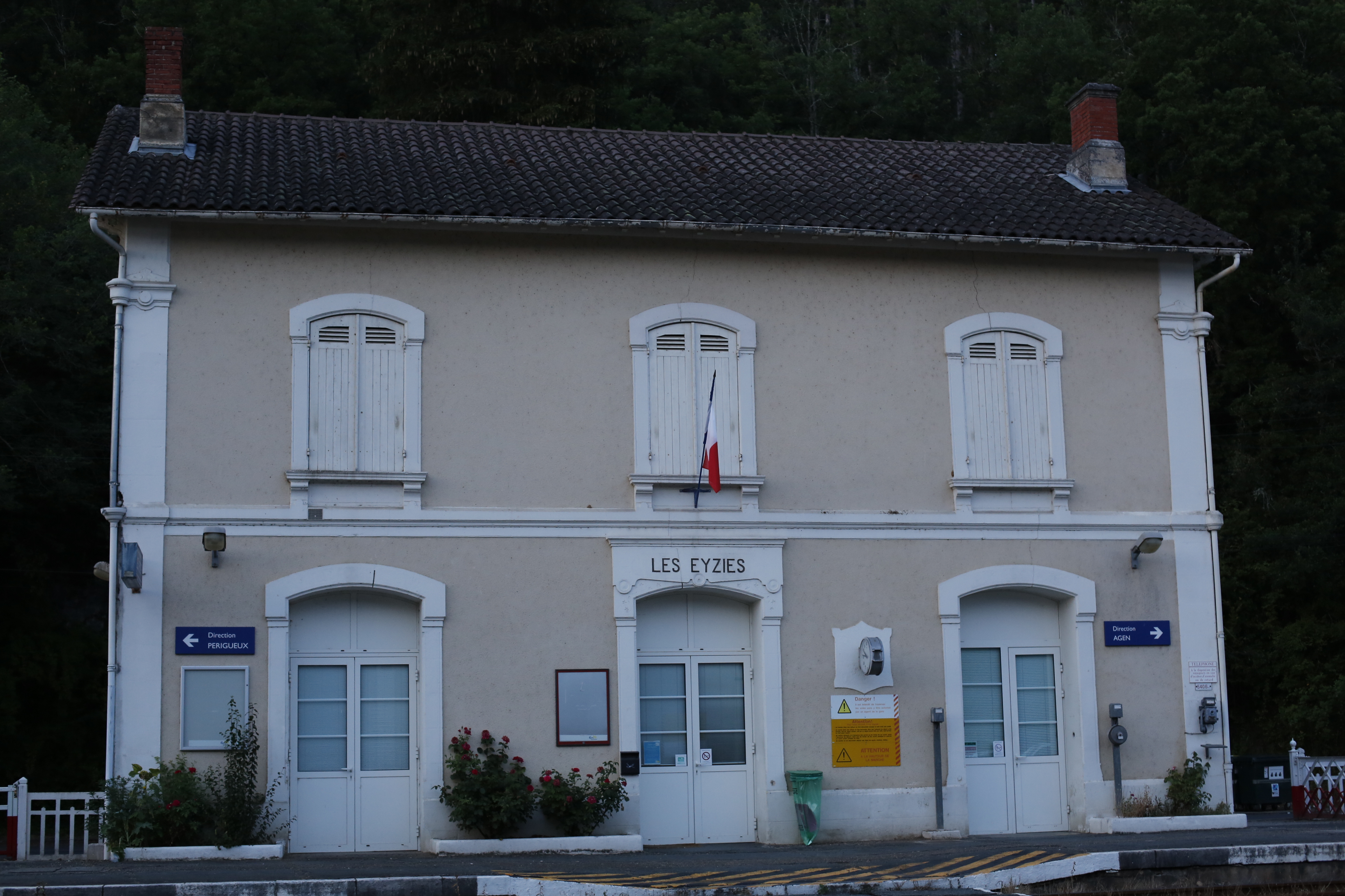 Façade sud-ouest de la gare des Eyzies.